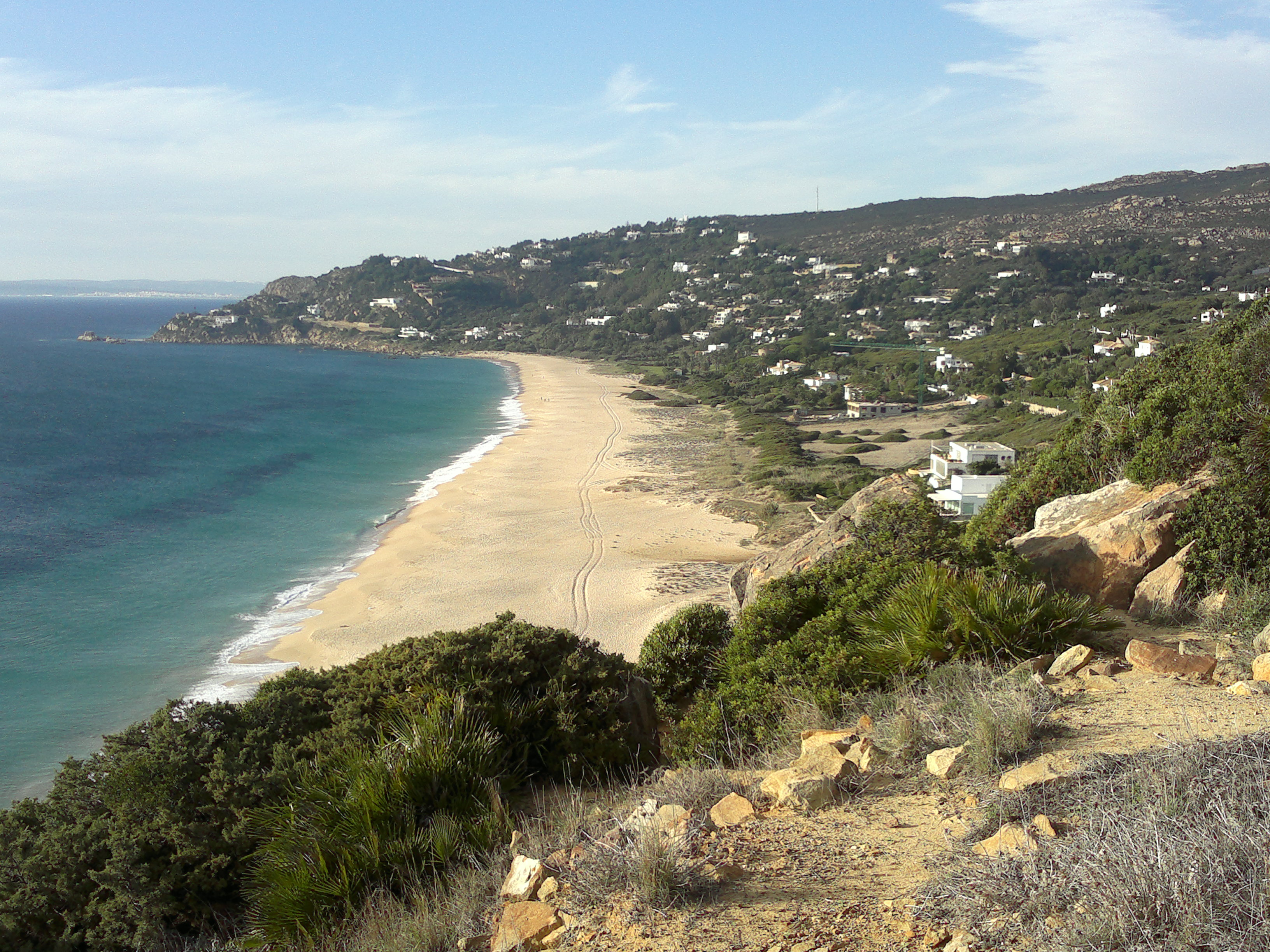 playa de los alemanes en Atlanterra en zahara de los atunes, Cádiz